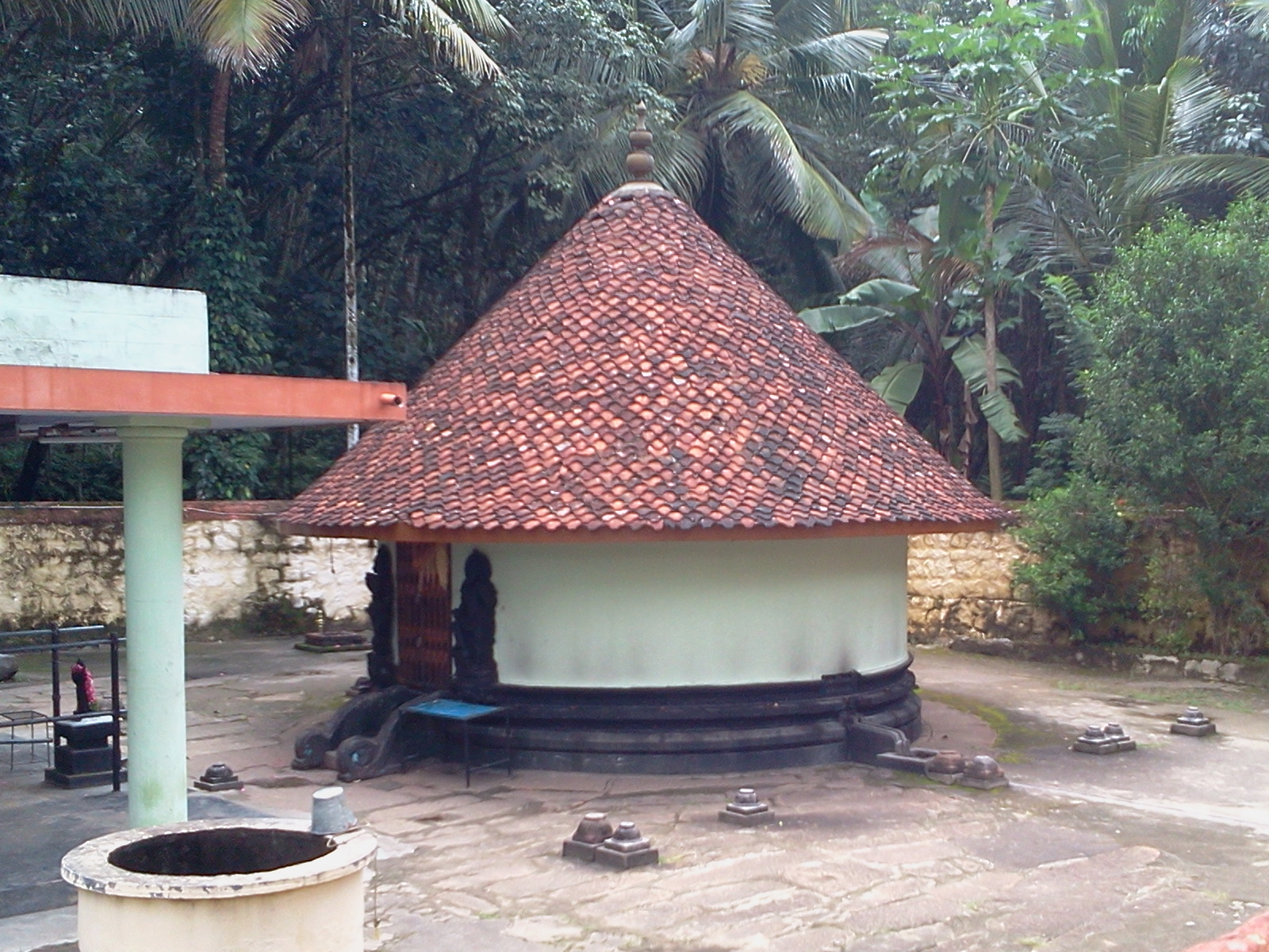 Mughavoor Old Photo